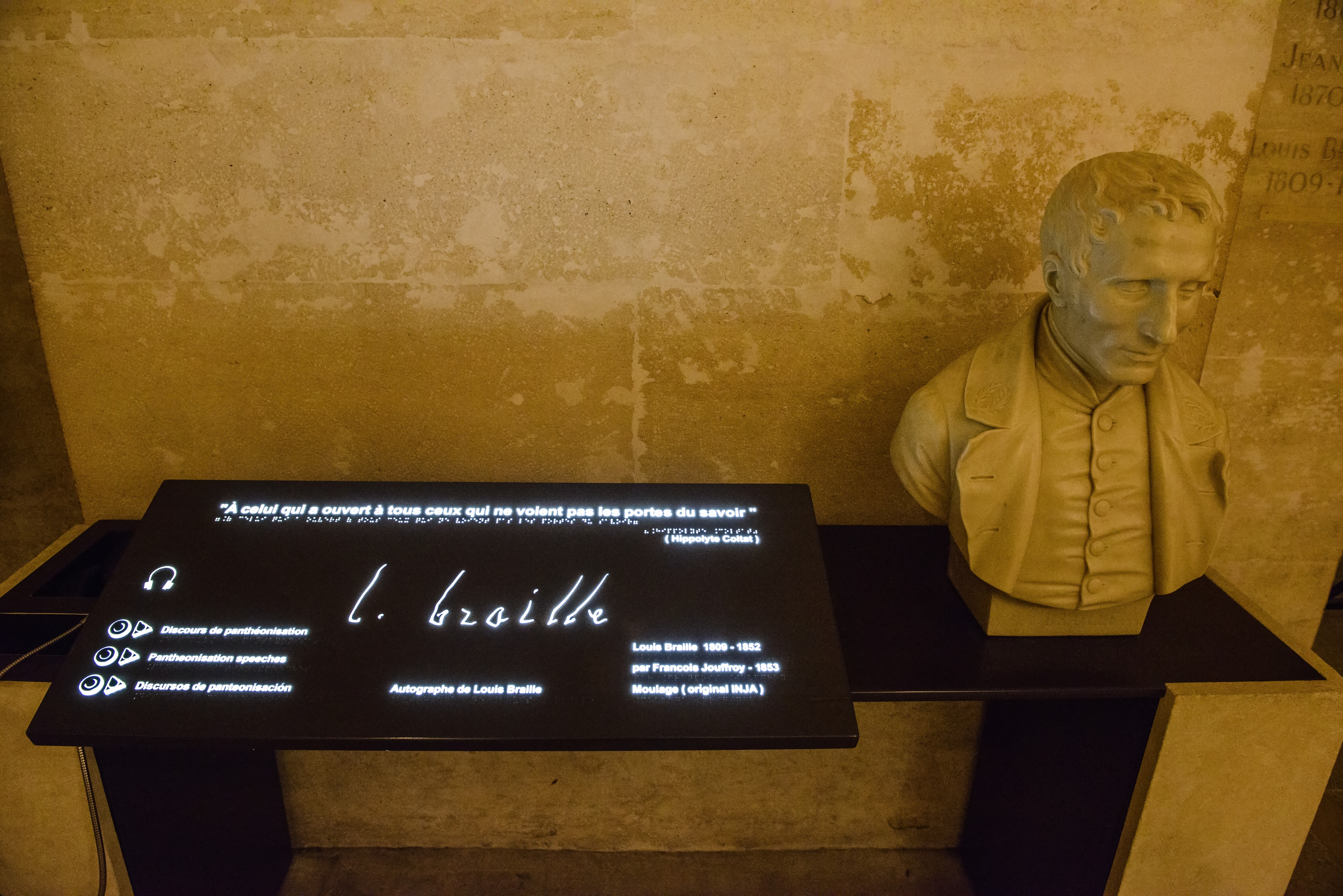 Paris.